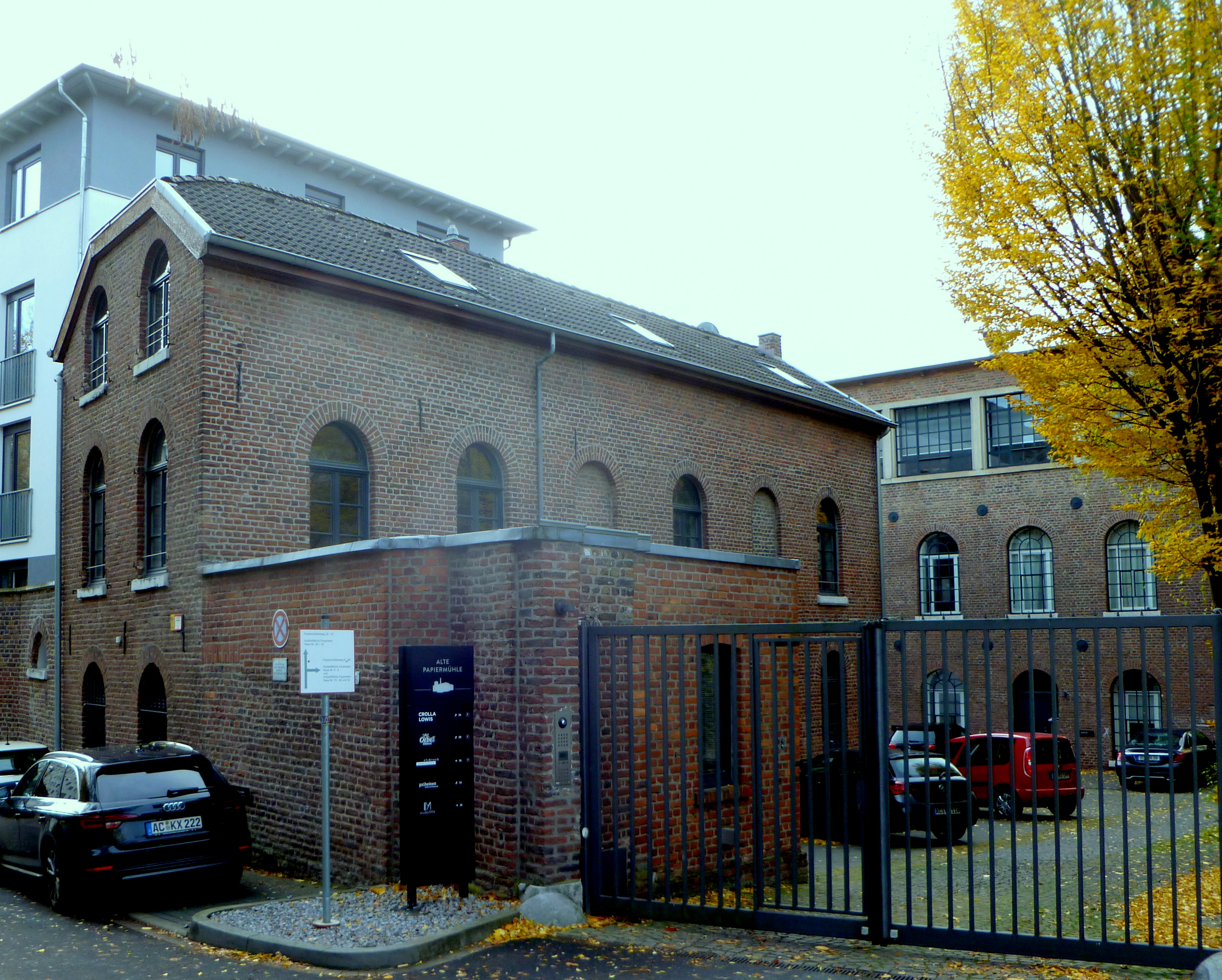 ehemalige Pförtnerwohnung und Pförtnerhaus der Tuchfabrik Pastor/Neuwerk in der Augustastraße 78-80 inAachen